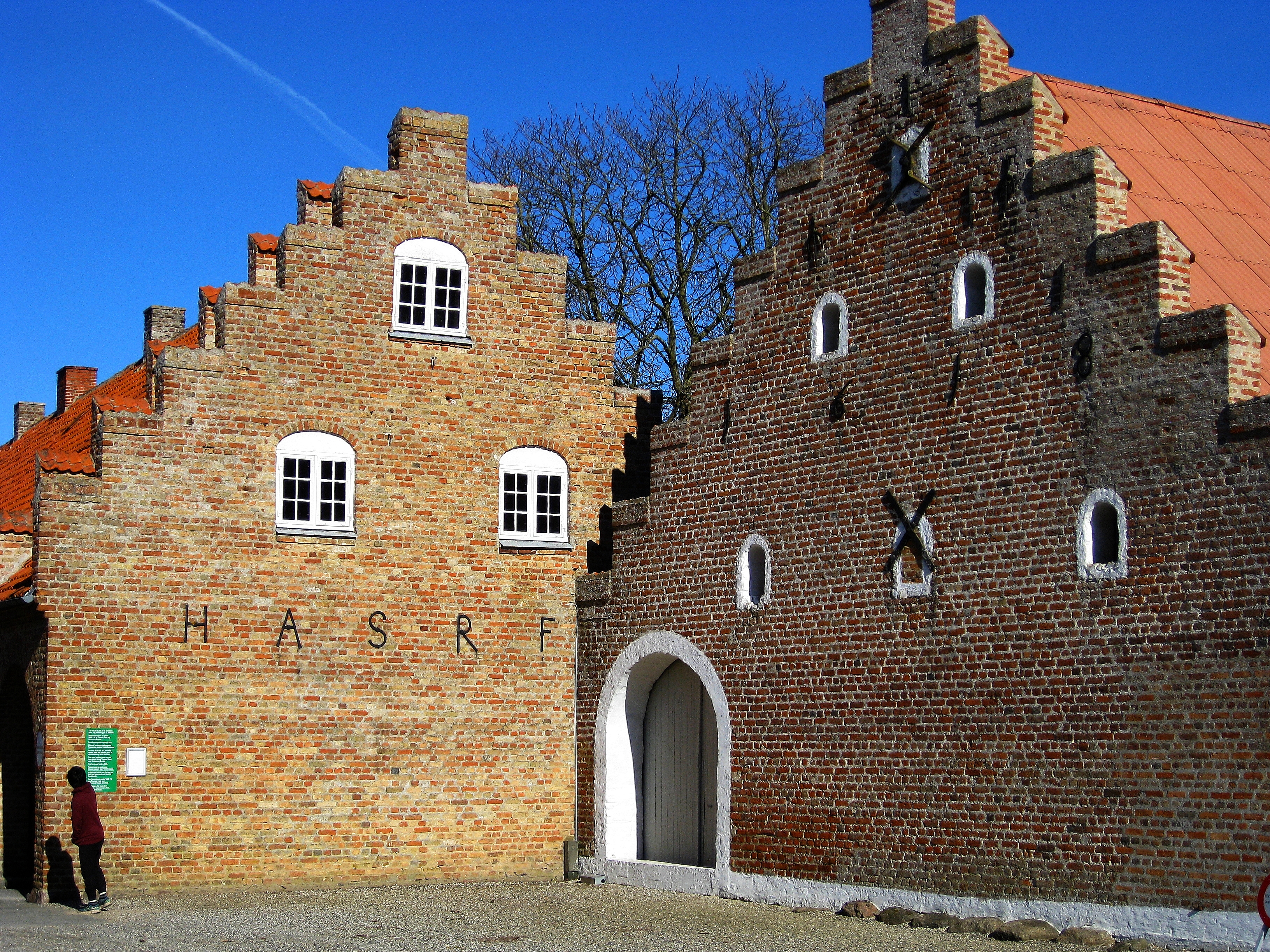 Katholm Slot, indgangsparti